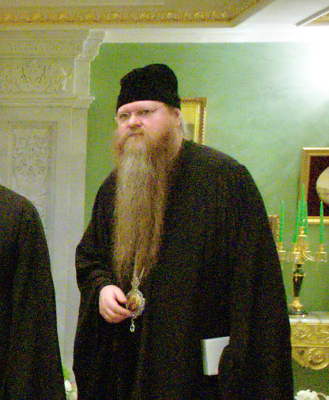 Епископ Агапит в Переделкине